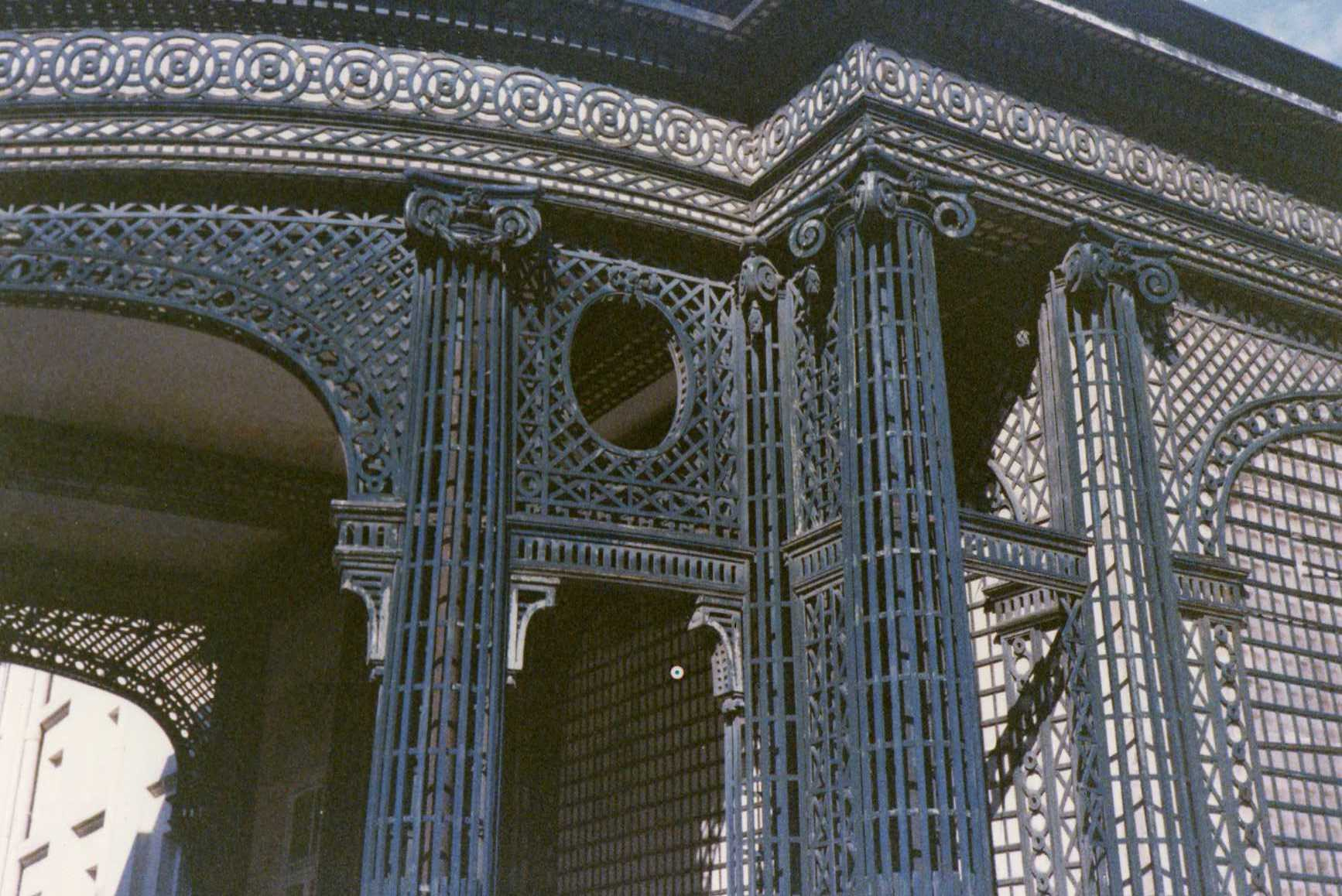 Decoratie Vauxhall, Warandepark, Brussel